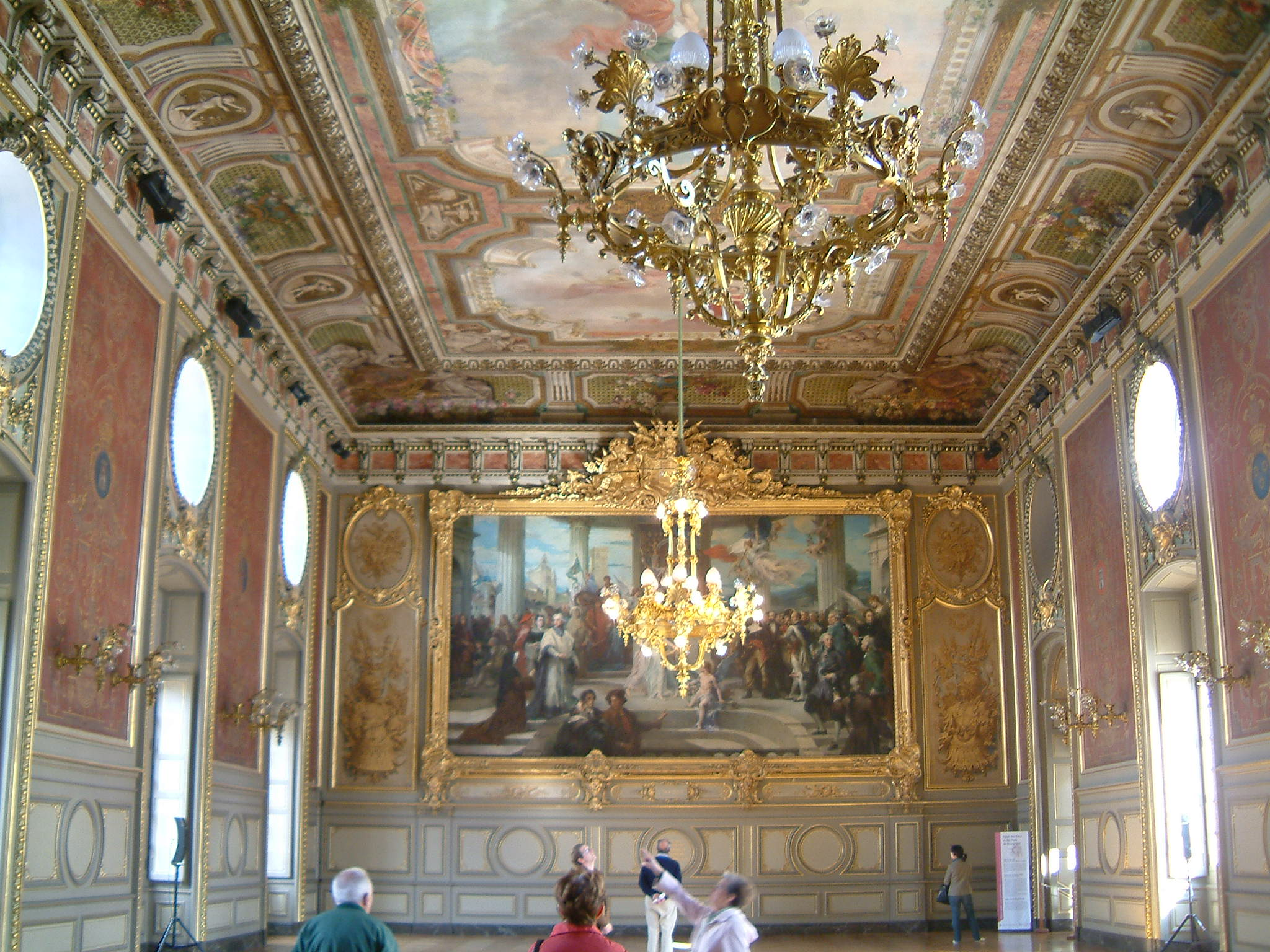 Palais des Ducs de Bourgogne, Dijon, Bourgogne, FRANCE. la toile au fond, Etude pour las gloires de la Bourgogne, est d'Henri Léopold Lévy